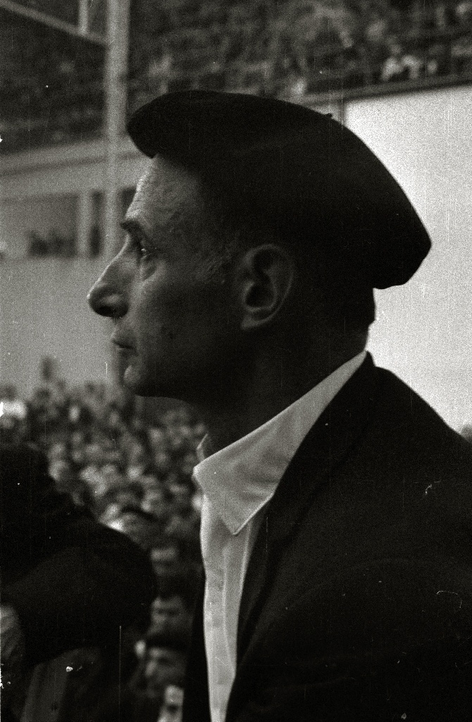 Título original: Campeonato de bertsolaris celebrado en el frontón Anoeta (13/17) Localización: San Sebastián (Guipúzcoa)